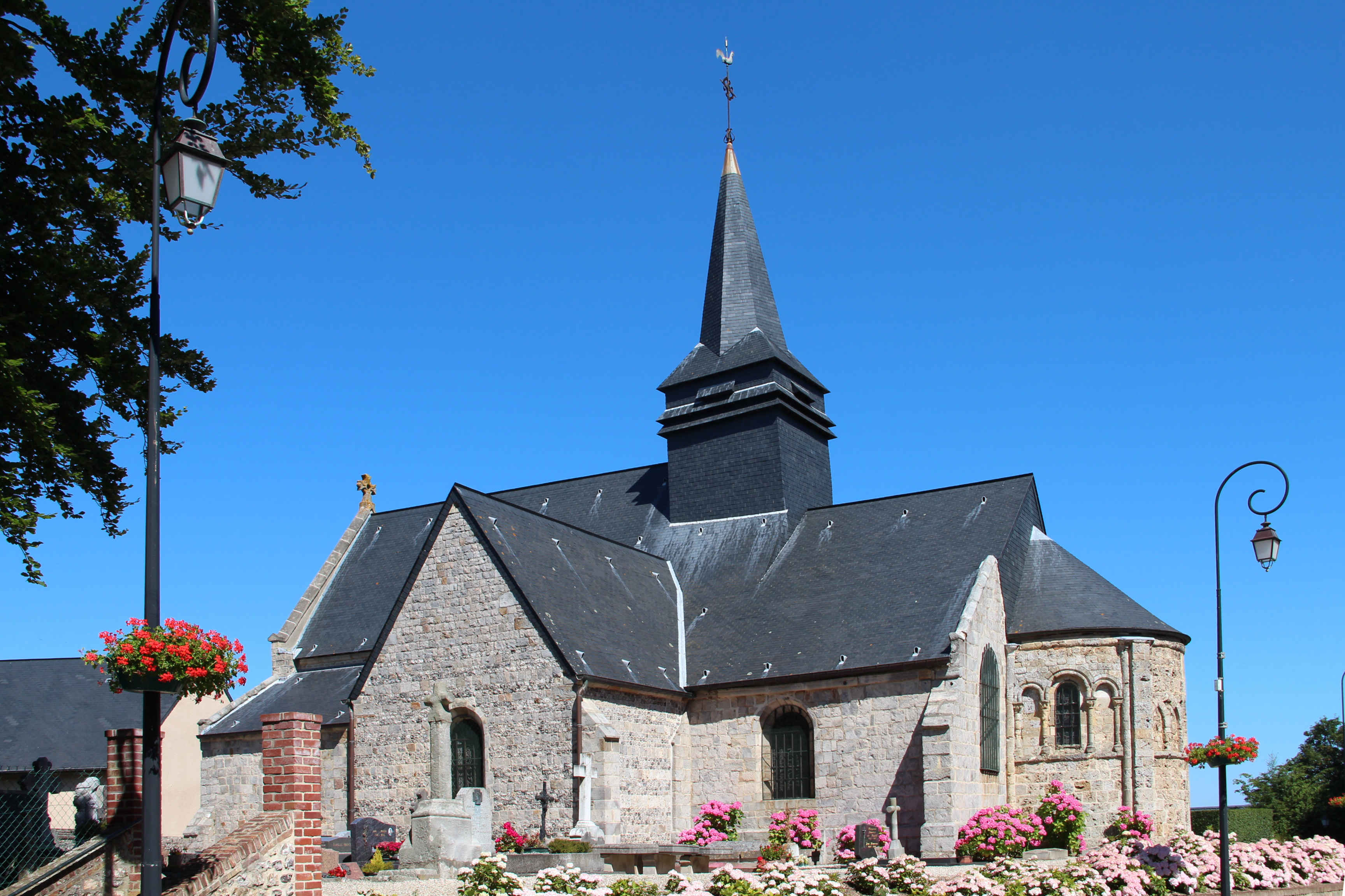 Sainte-Marguerite-sur-Mer (Seine-Maritime France), l'église Sainte-Marguerite. .